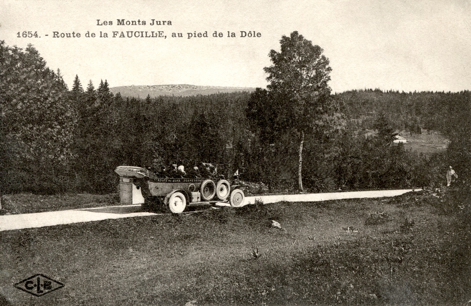 Promenade automobile dans le Jura, avant 1914. Les monts Jura, route de la Faucille, au pied de la Dôle.